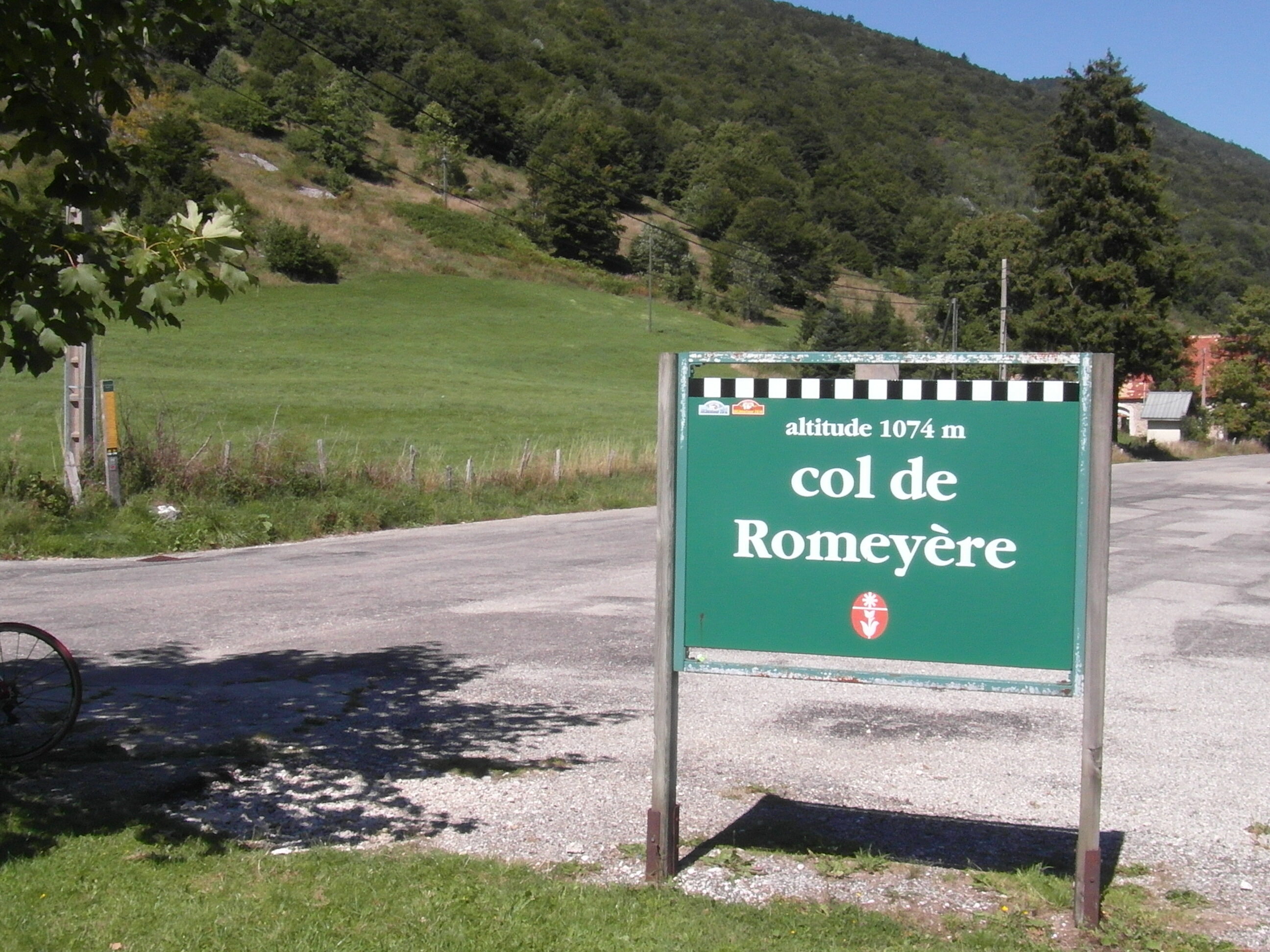 Col de Romeyère